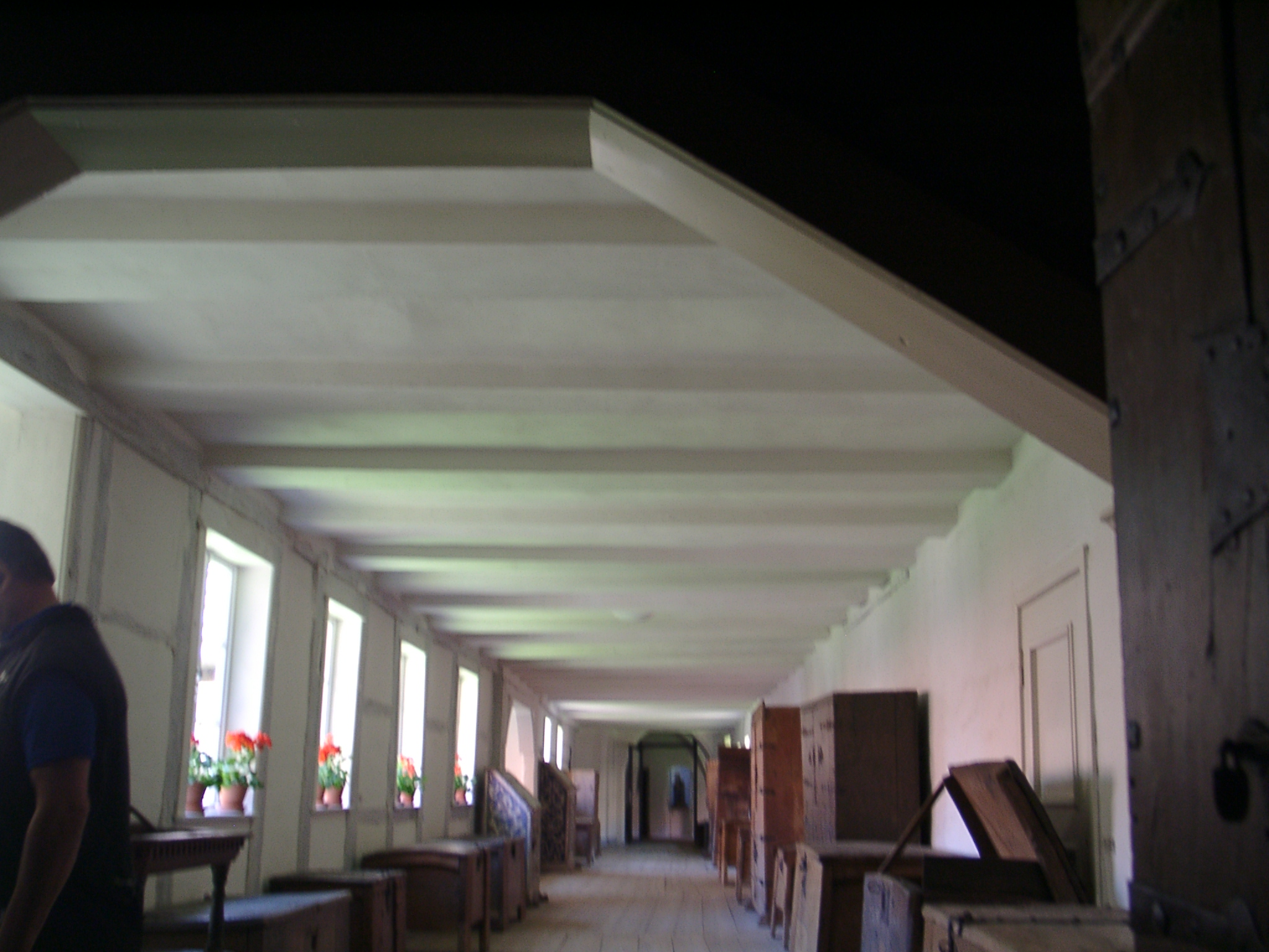 Wienhausen monastery